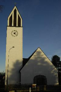 Johanneschurch in Vännäs, Sweden